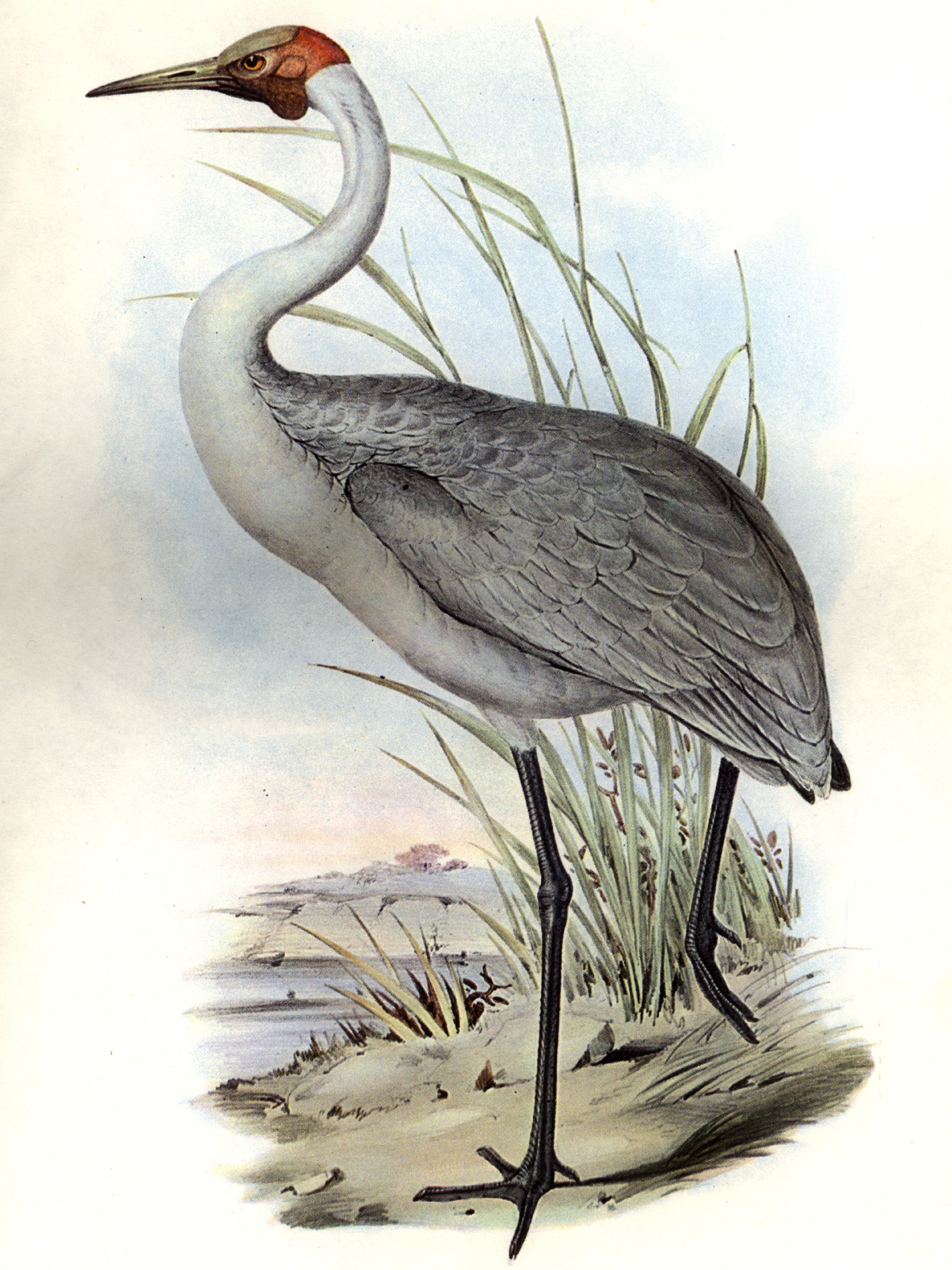 Australian Brolga Grus rubicunda